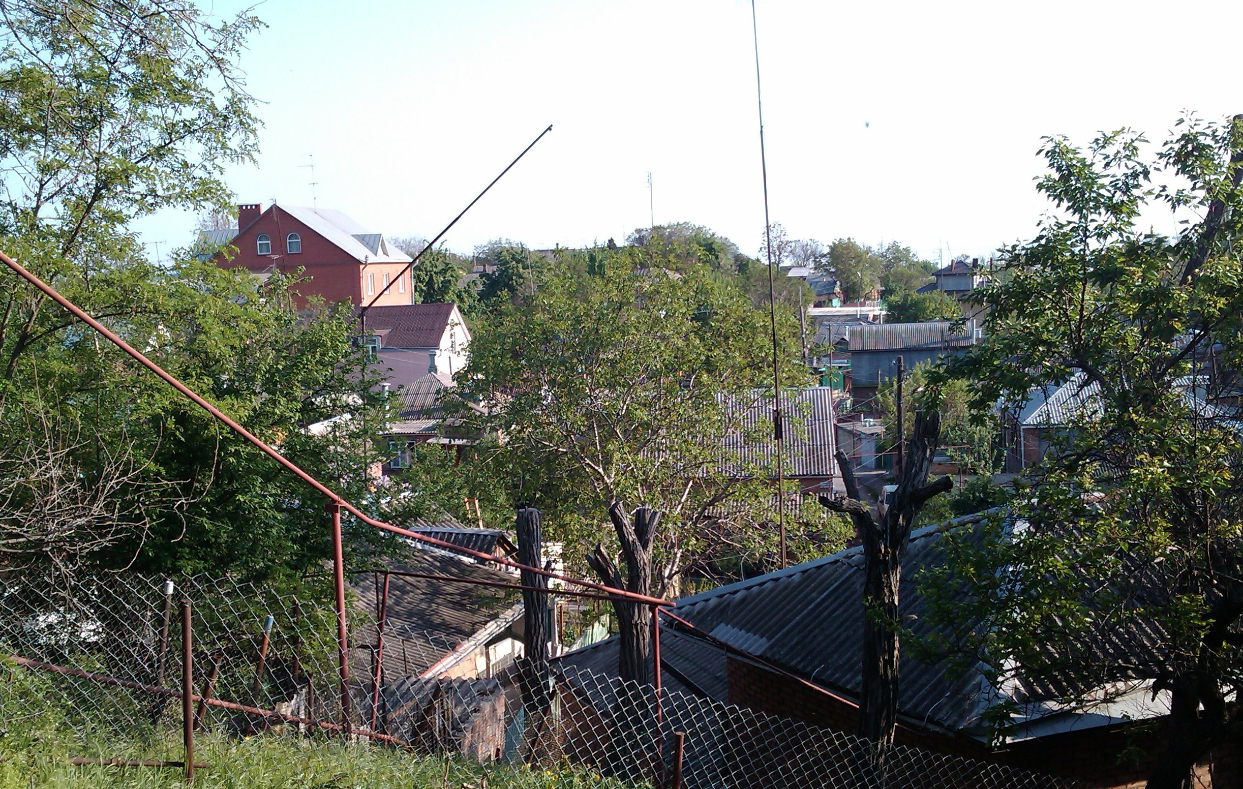 Таганрог, вид на Богудонию со стороны ул. Чехова